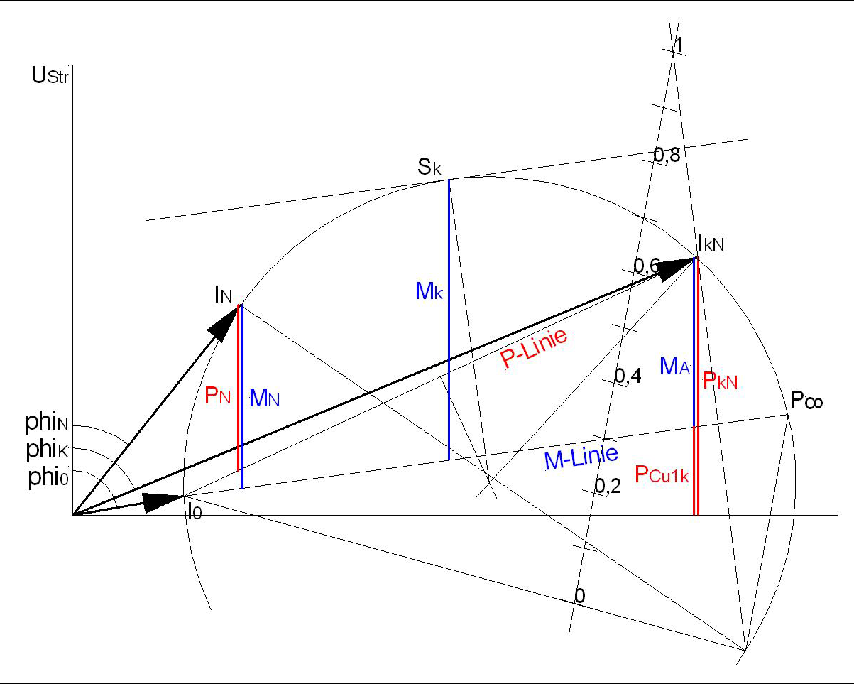 Ortskurve eines Asynchronmotors mit Konstruktionshilfslinien Sonstiges